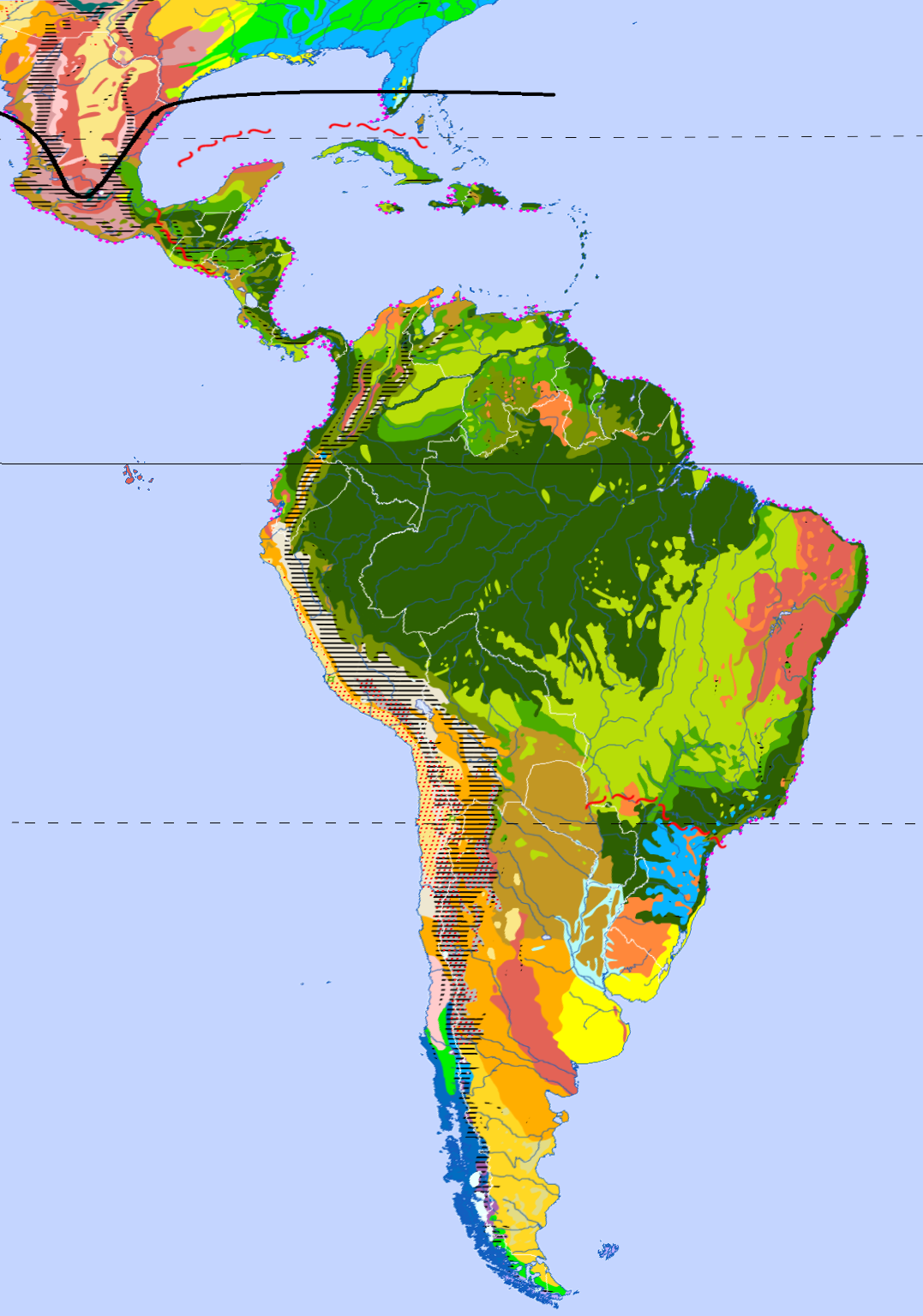 Eisschilde u. Gletscher Immergrüner borealer Nadelwald Winterkalte Halbwüsten Trockensavannen Kältewüste Gebirgs-Nadelwälder Winterkalte Wüsten Dornstrauch- u. Kakteensavannen Flechten- u. Moostundra Gemäßigte Küsten-Regenwälder Hartlaubvegetation Tropische Trockenwälder Zwergstrauch- u. Wiesentundra Laub- u. Nadelmischwälder Heiße Halbwüsten Regengrüne Feuchtsavannen Bergtundra, alpine Matten u. Heiden Gemäßigte Laub- u. Auenwälder Heiße Wüsten Trop. u. ʅ Subtrop. Regengrüne Feuchtwälder Laubholz Waldtundra u. boreale Auen Gemischte Waldsteppen Hochlandsteppen u. -wüsten Trop. u. ʅ Subtrop. Regenwälder Nadelholz Waldtundra Grassteppen u. Salzwiesen Subtropische Trockenwälder Tropische Gebirgsregenwälder Sommergrüner borealer Nadelwald Strauch- u. Trockensteppen Subtropische Feuchtwälder Riedsümpfe u. flutende Wasserpflanzen ≡ = Gebirgszüge ::: = vegetationslose Wüstenregionen ⋮¤⋮ = Oasenvegetation (z.T. mit Begrenzung) ••• = Mangrovenküsten